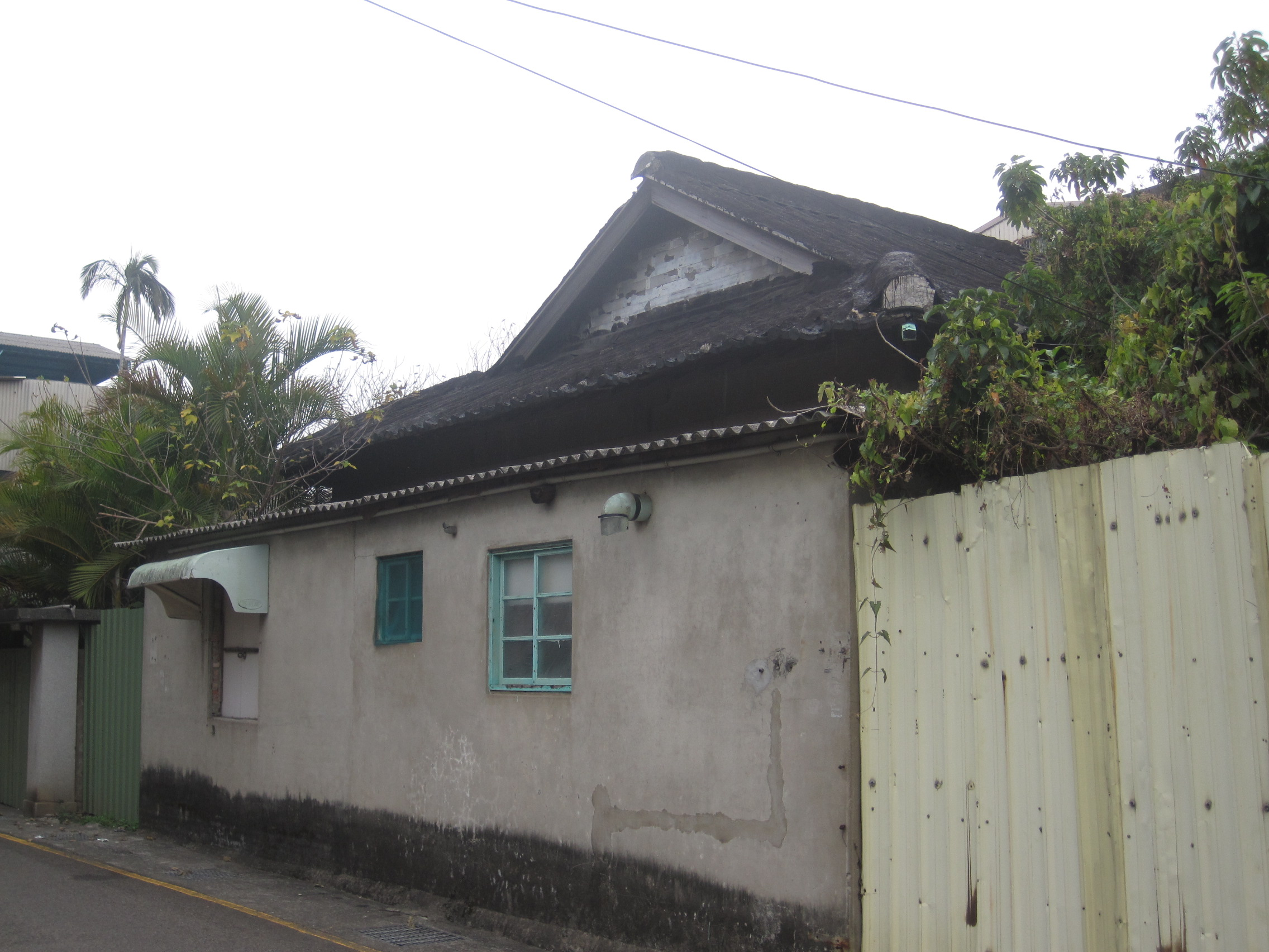 新竹少年刑務所演武場